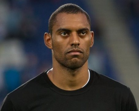 Дуглас під час виступів за Дніпро